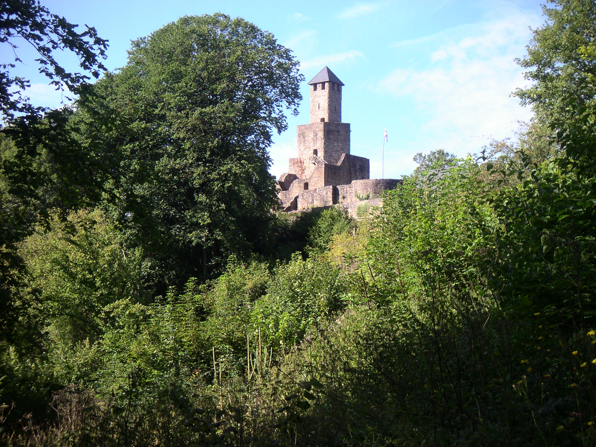 Saar-Hunsrück-Steig, Grimburg